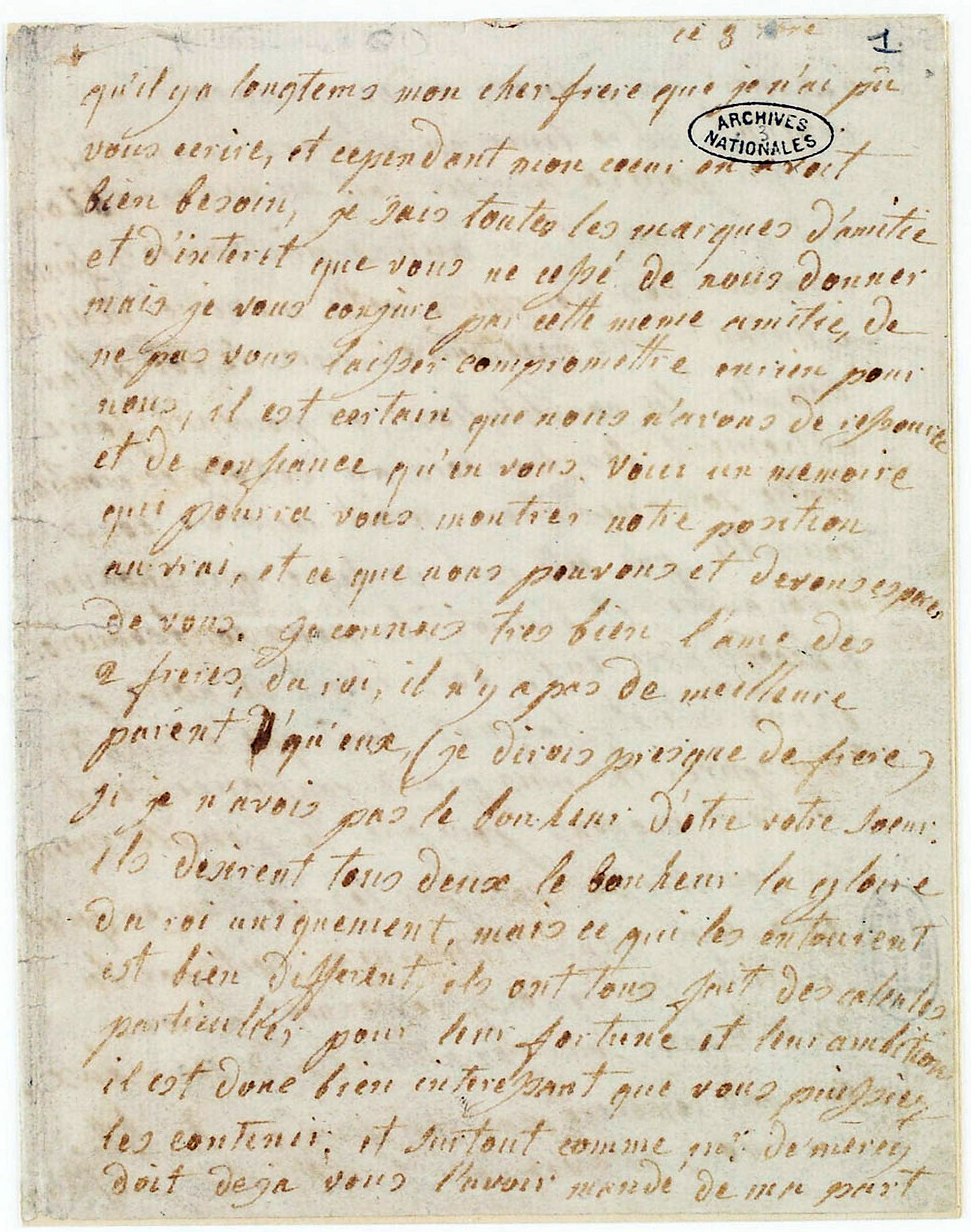 Lettre de Marie-Antoinette à son frère l'empereur Léopold II en date du 8 septembre 1791. Autographe sur papier.